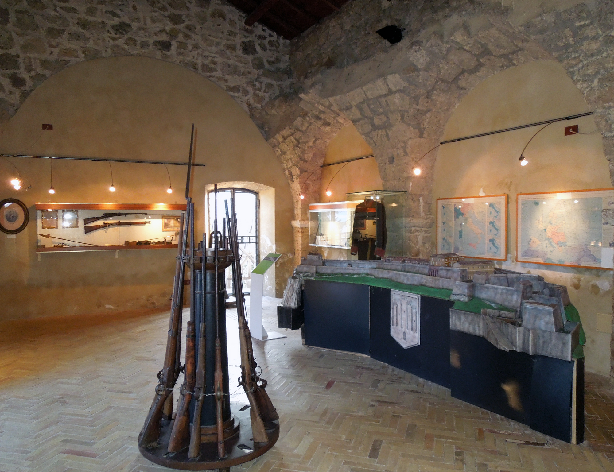 Sala espositiva del Museo delle Armi interno alla Fortezza di Civitella del Tronto (TE). Un sentito ringraziamento al Dottor Fabio Bracchi, referente della gestione della Fortezza che, accordandomi il permesso, ha consentito lo scatto di questa immagine.